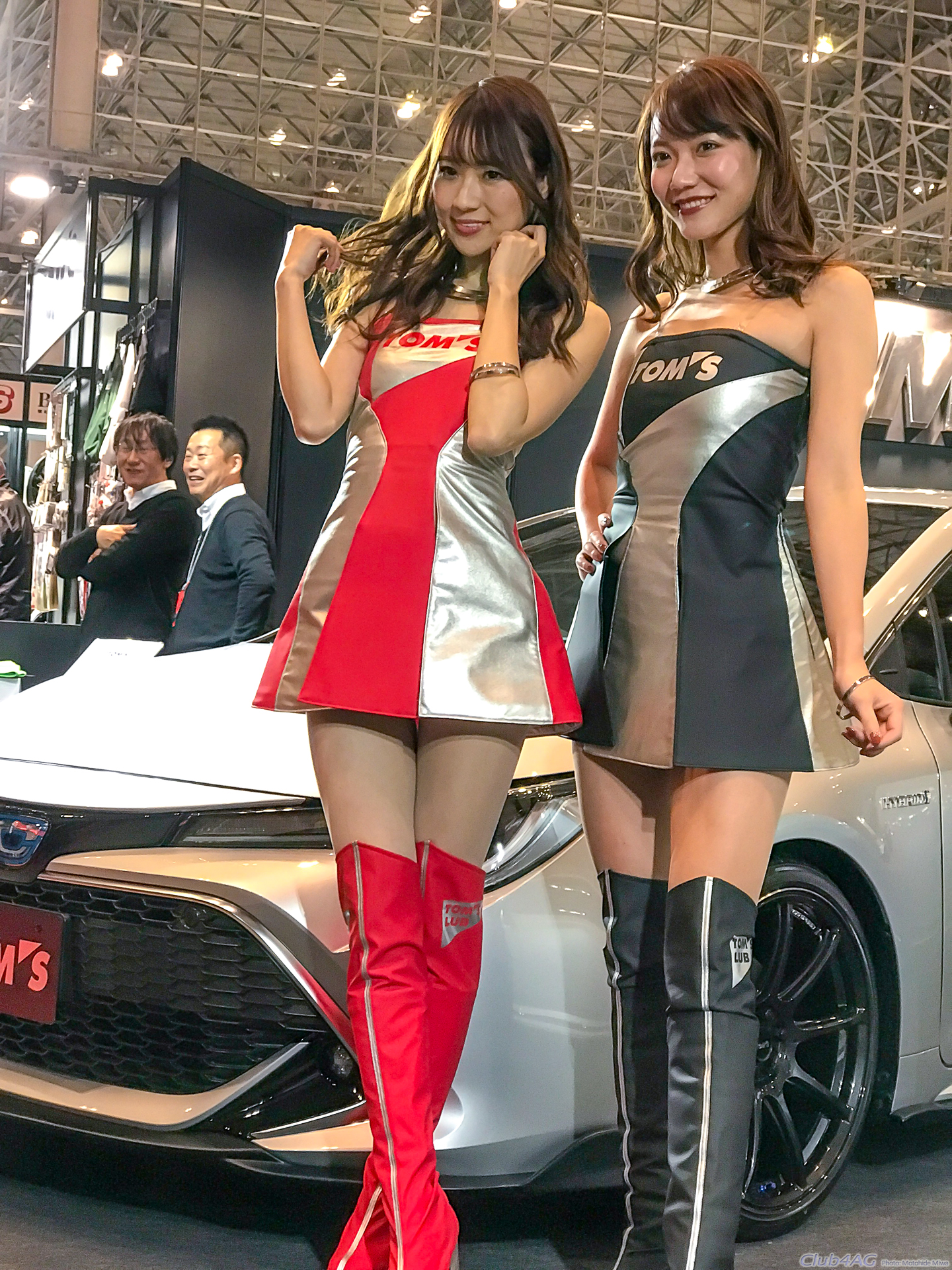 Tokyo Auto Salon 2019